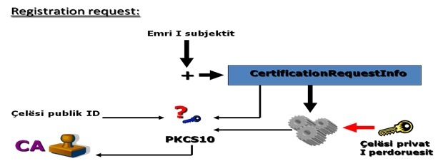 Kerkesa e regjistrimit